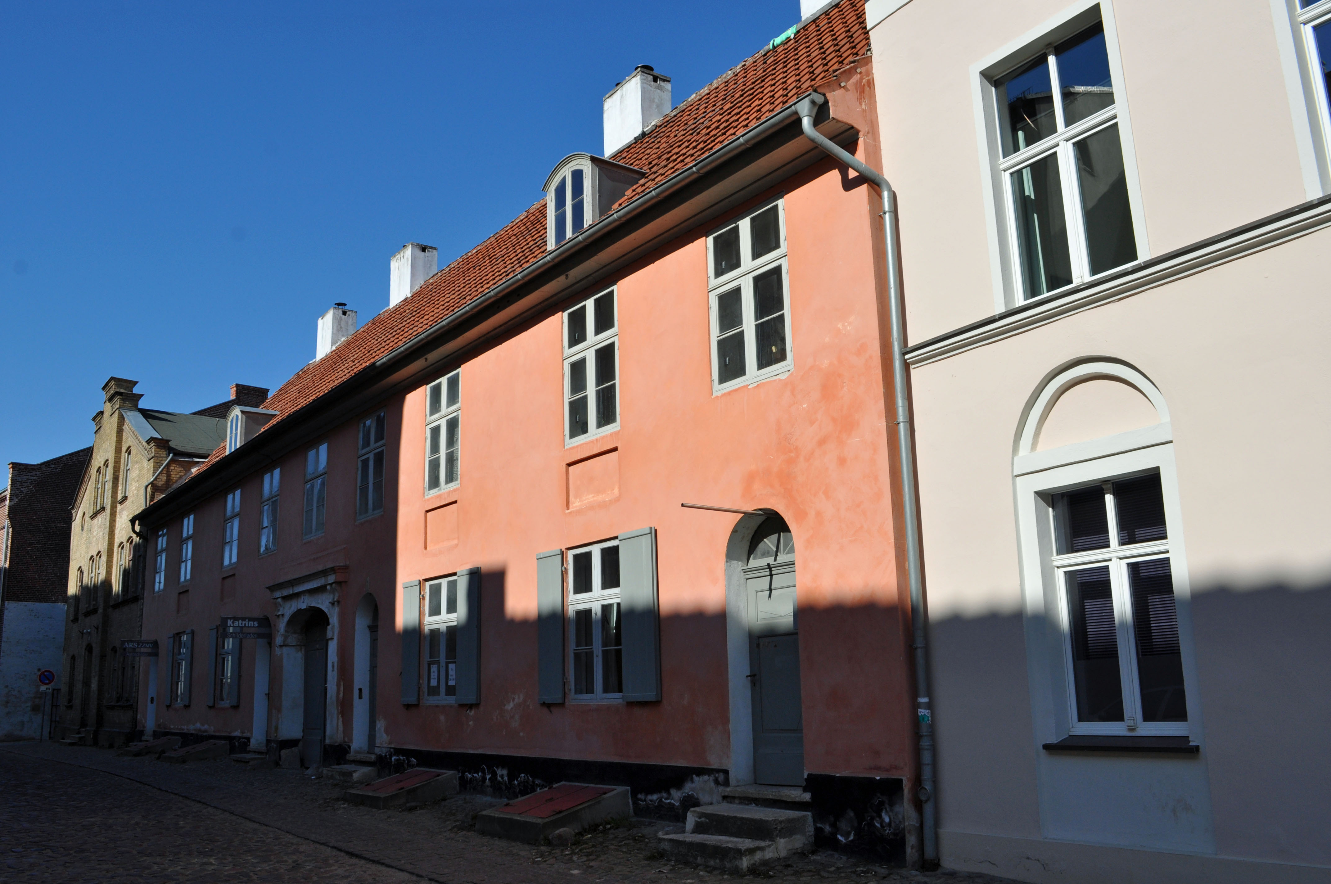 Gebäude bzw. Gebäudedetail in Stralsund. Straße und Hausnummer siehe Dateiname.